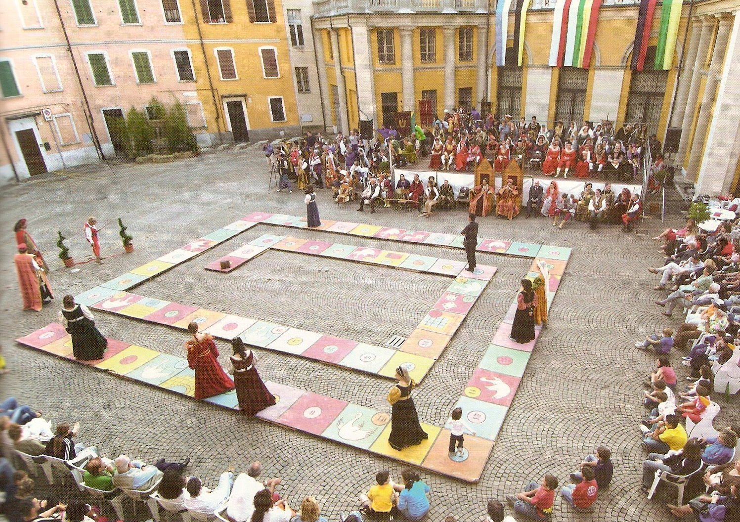 Mortara, Palio del gioco dell'oca 2007: rievocazione dello storico Gioco dell'oca in costume.